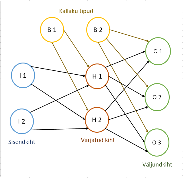 Lihtne närvivõrgu mudel mis koosneb sisend, peidetud ja väljund kihi neuronitest ja kallaku tippudest.